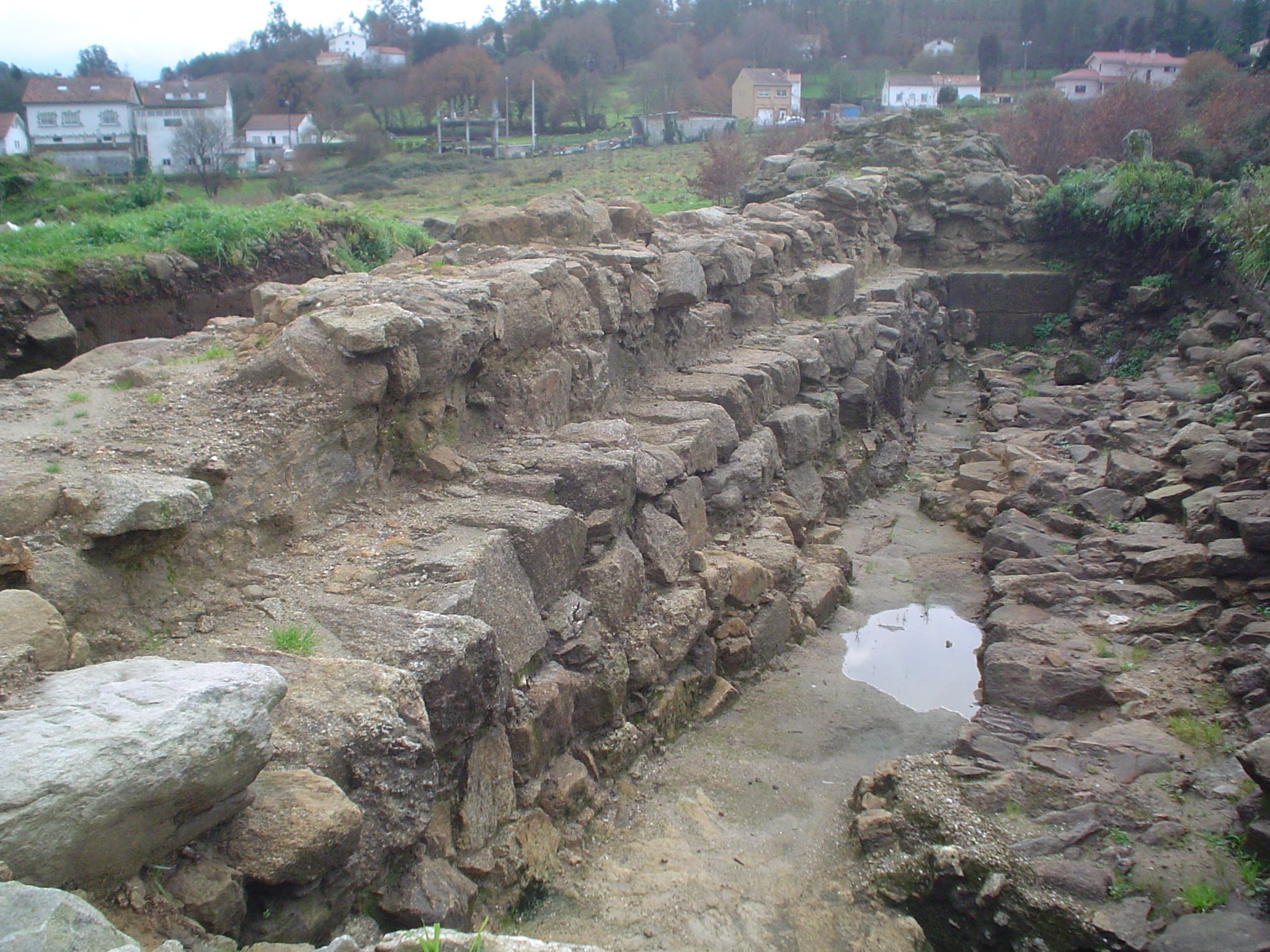 Castelo da Rocha forte. Conxo - Santiago. Muro noroeste